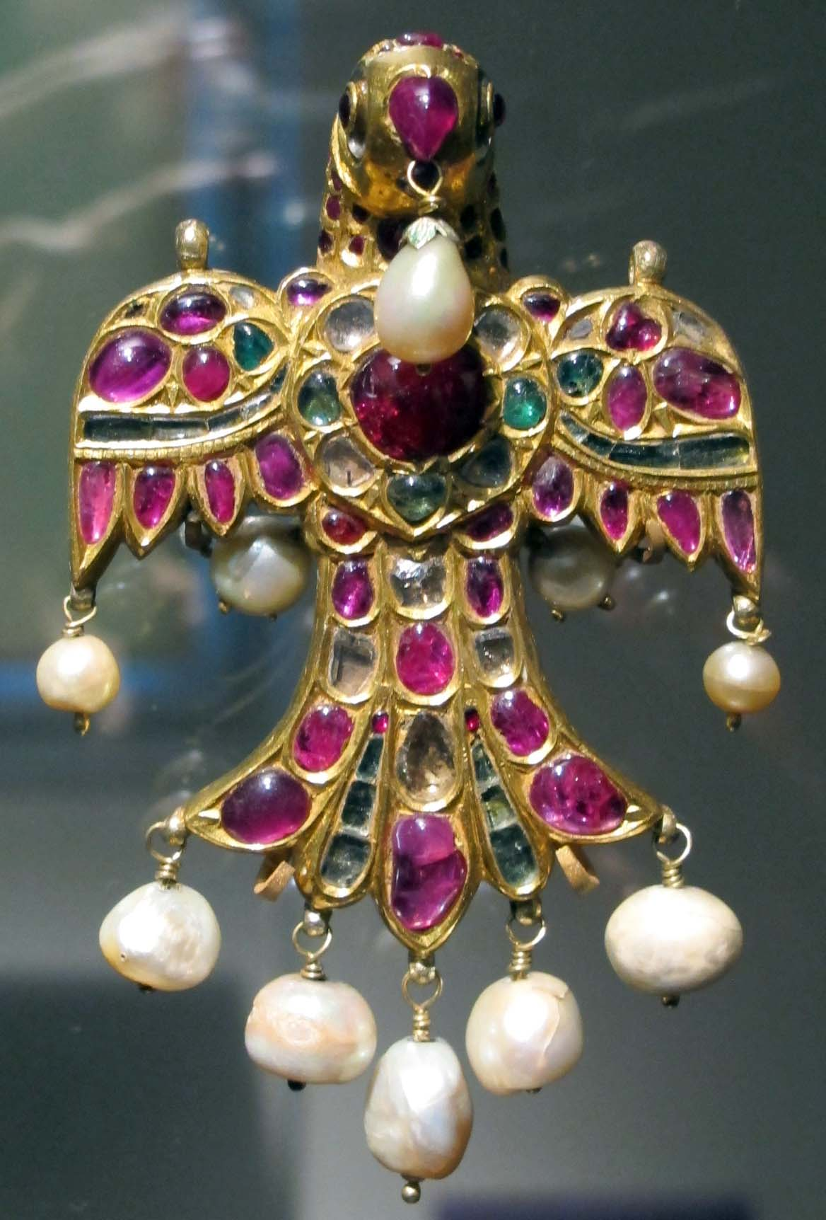 India moghul, pendente d'oro diamanti e rubini a forma di uccello, xvii sec